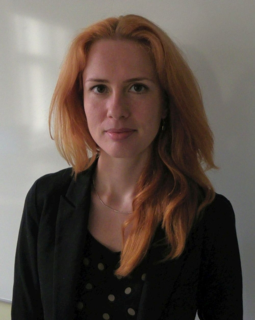 Vivian Puusepp (sünninimi Vivian Bohl).